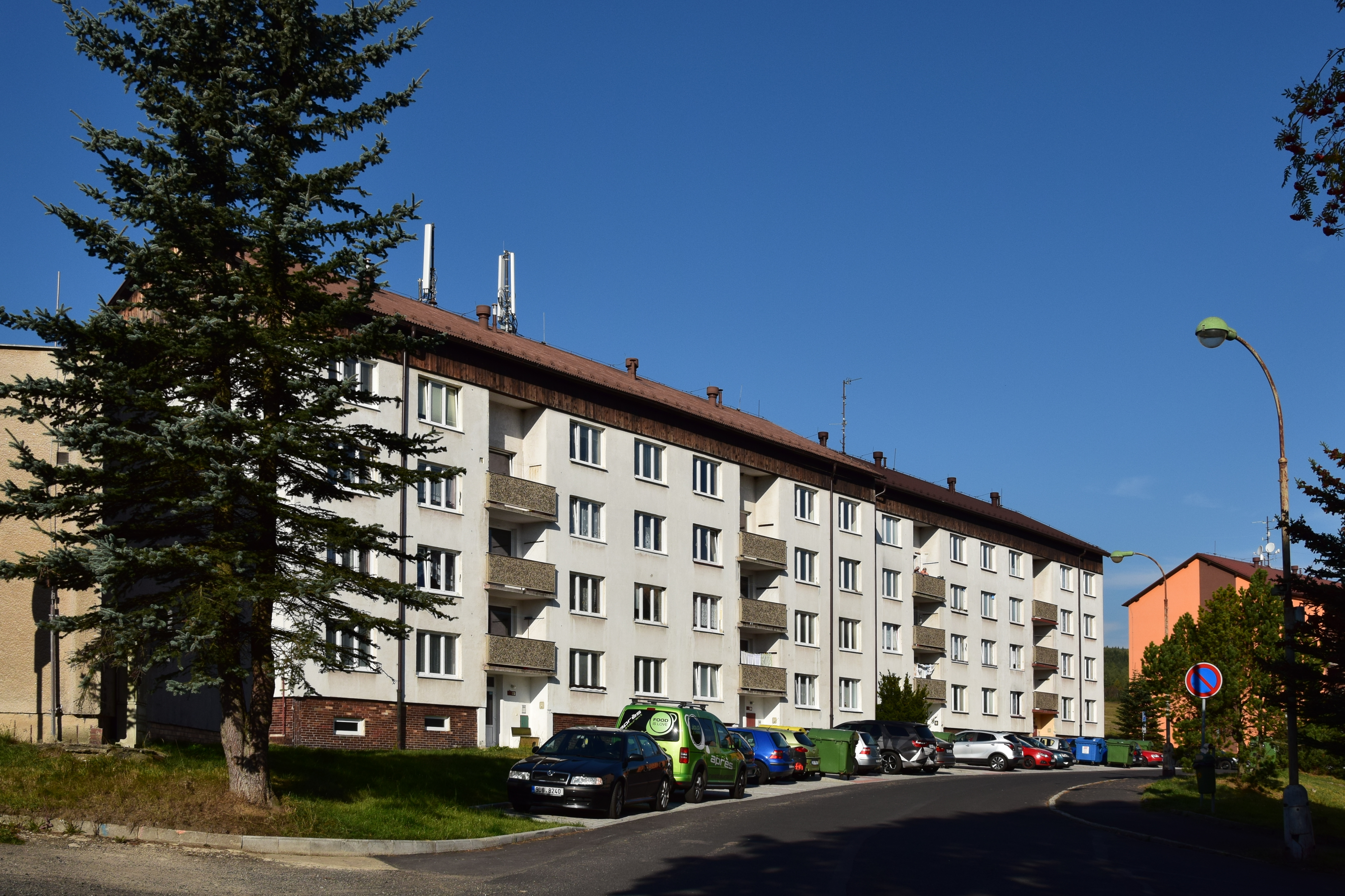 Kovářská – bytový dům